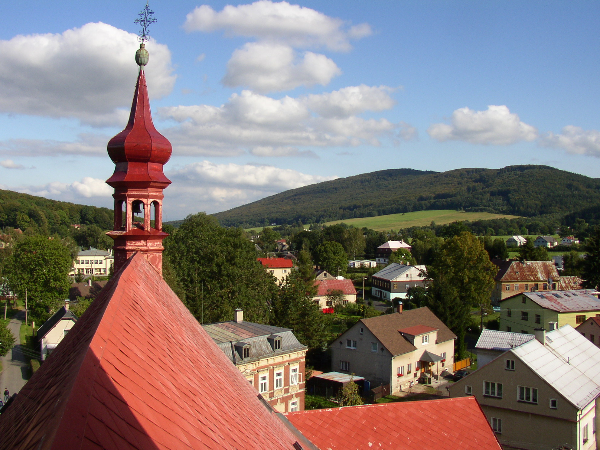 Pohled z věže kostela svaté Kateřiny na obec Dolní Podluží